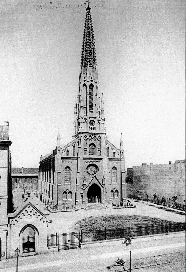 Kościół ewangelicko-reformowany, ul. Leszno, Warszawa, ok. 1890 r.